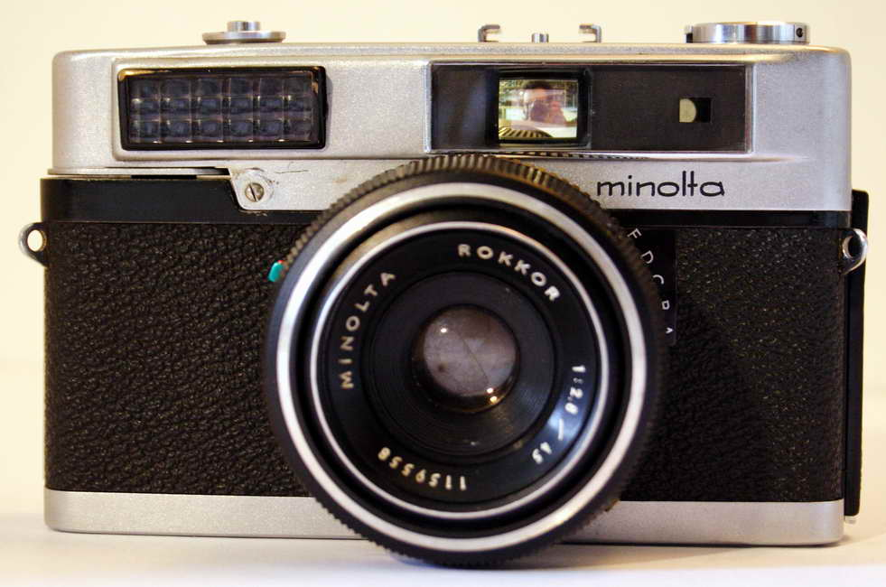 description:Minolta Uniomat Source:Photo personnelle auteur:Benoit Suaudeau Année 2006